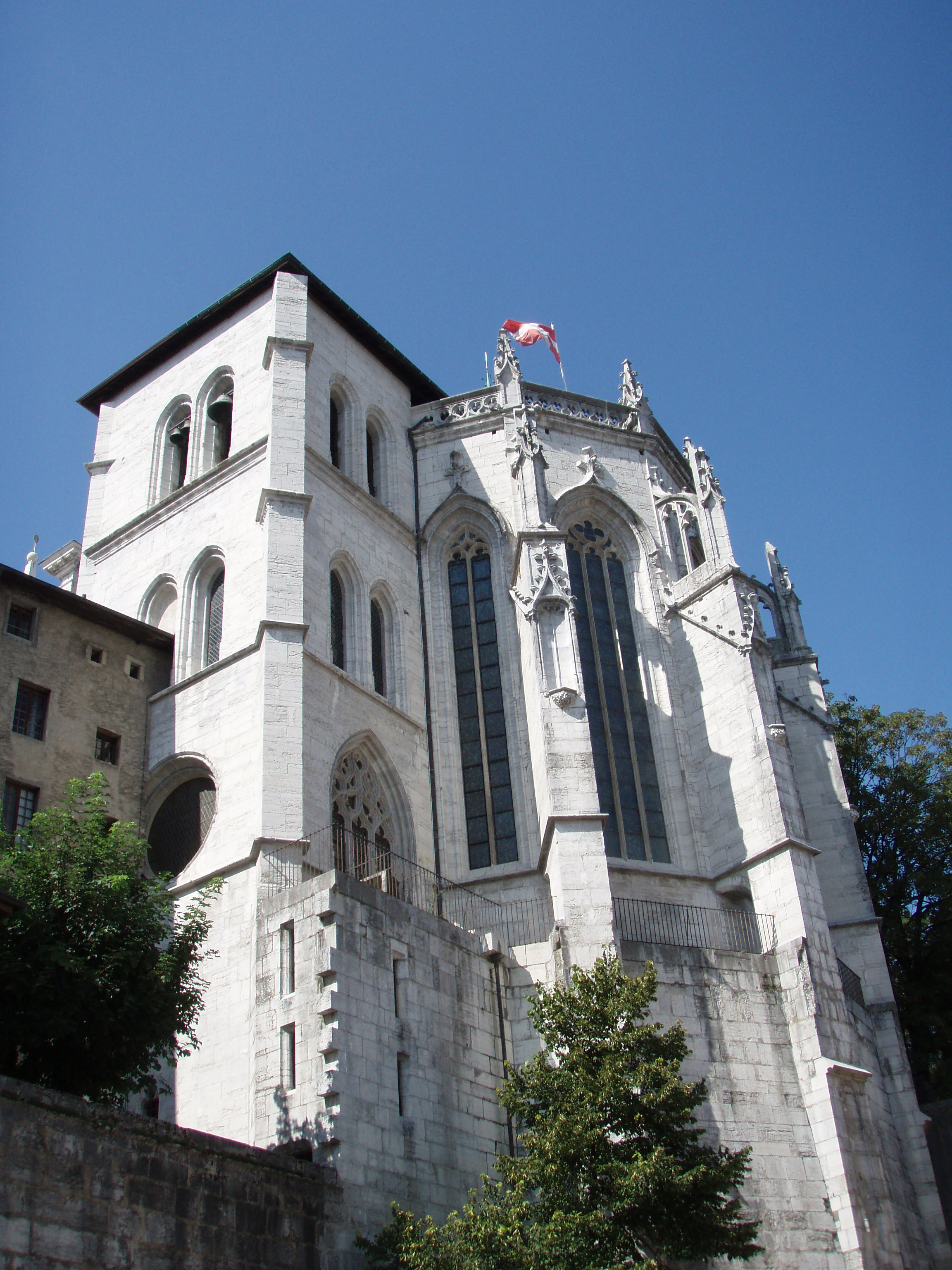 La chapelle du château de Chambéry (XVe siècle). Chambéry, Savoie, France.